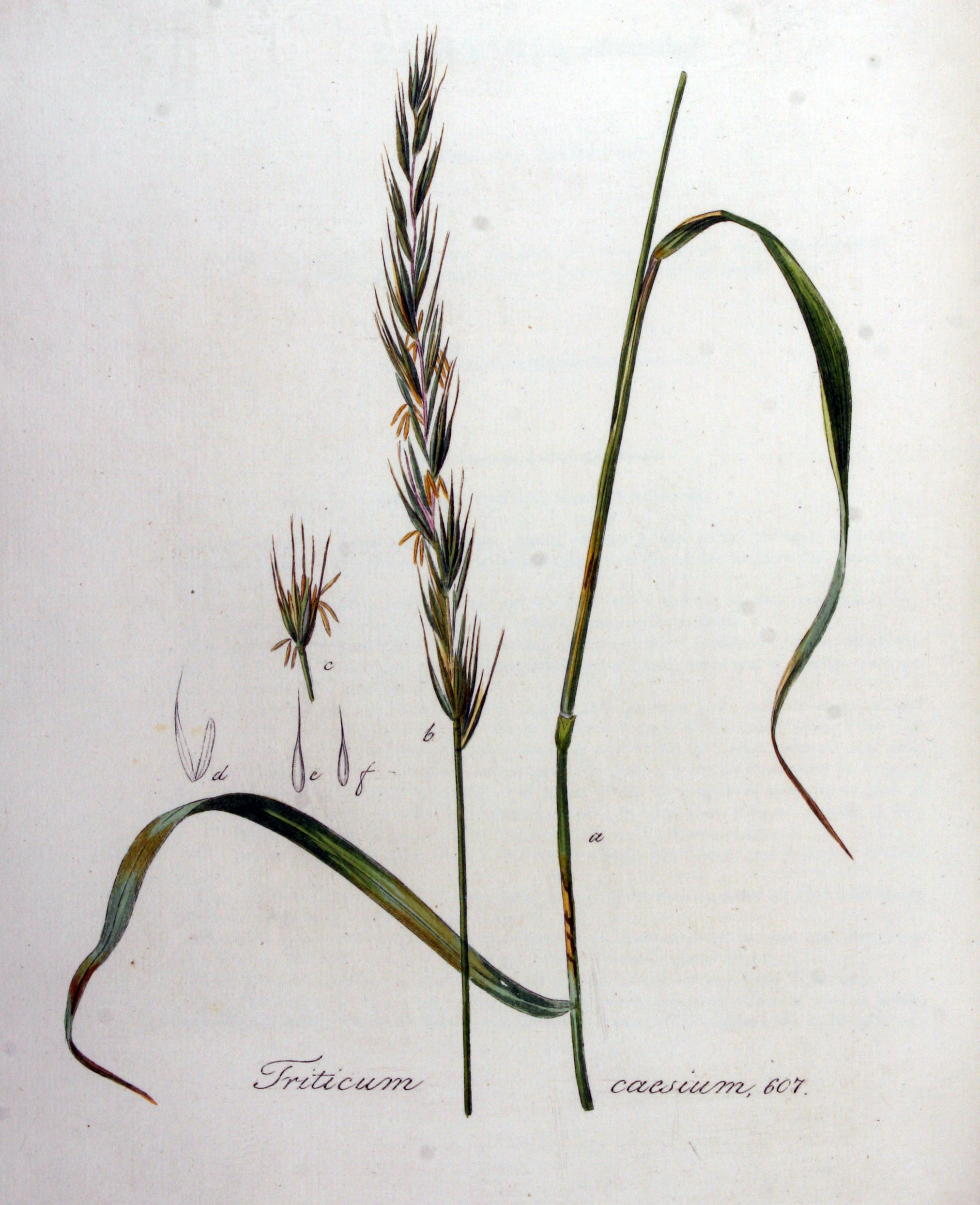 Elymus caninus (L.) L. (Syn. Triticum caesium Harz)